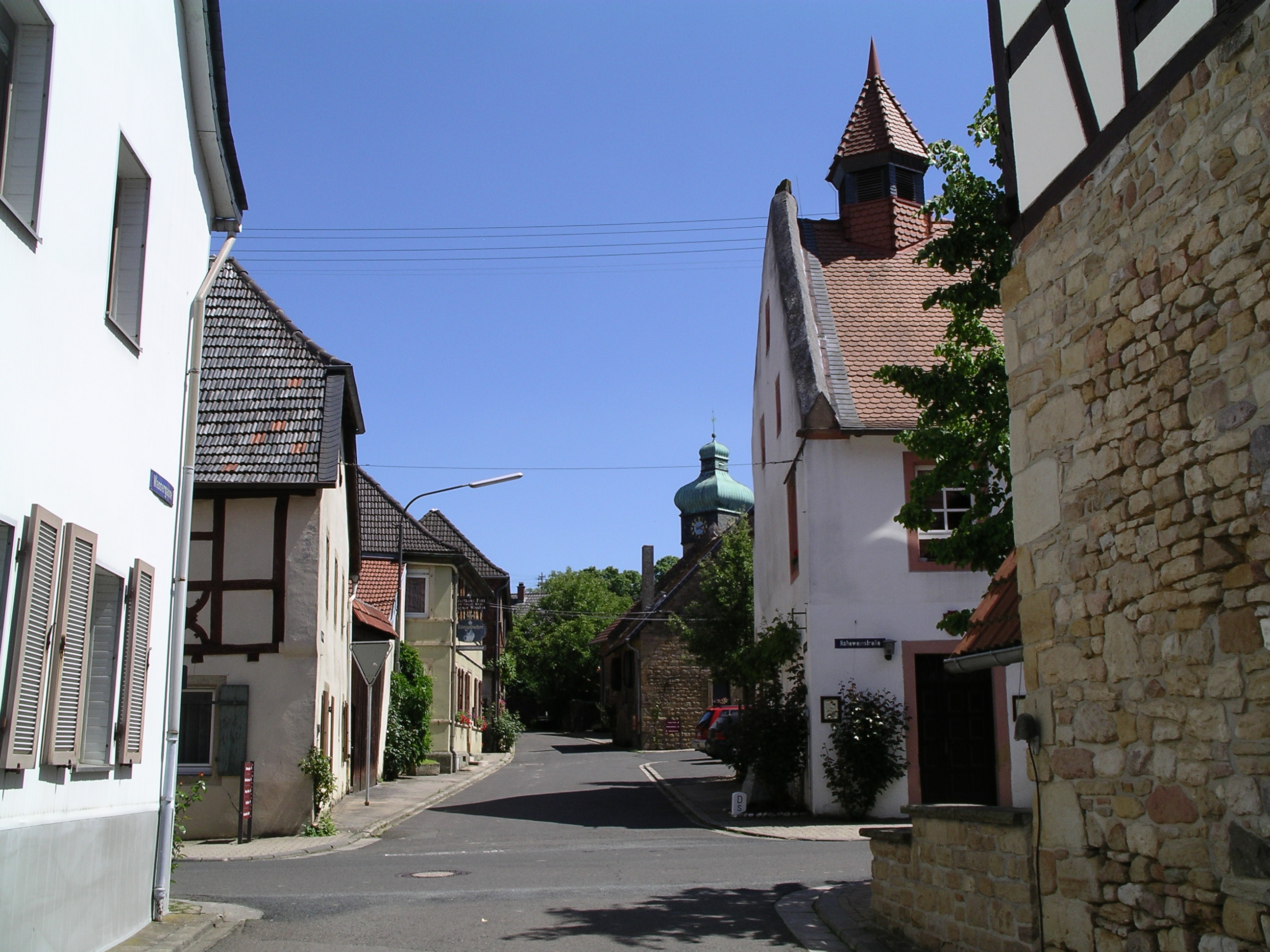 Duchroth, Dorfgasse, Rathaus, Kirche, Nahetal